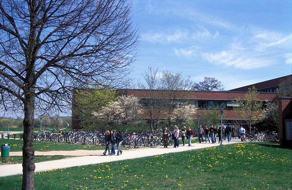 Bayreuth - Universitätscampus. Fakultät Rechts- und Wirtschaftswissenschaften (RW).